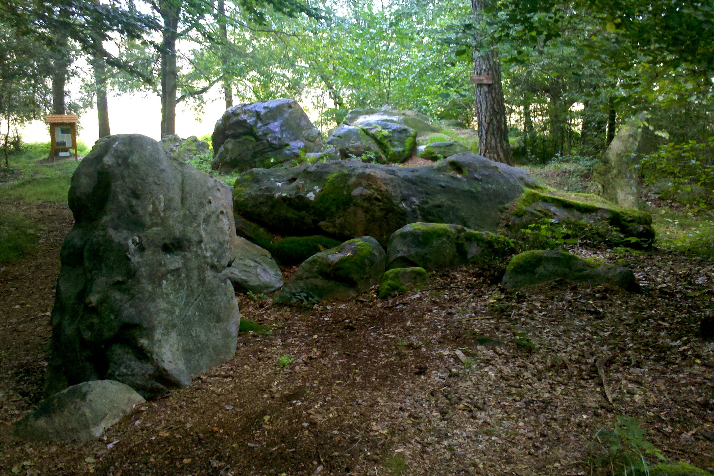 Ansicht der Wippchensteine.